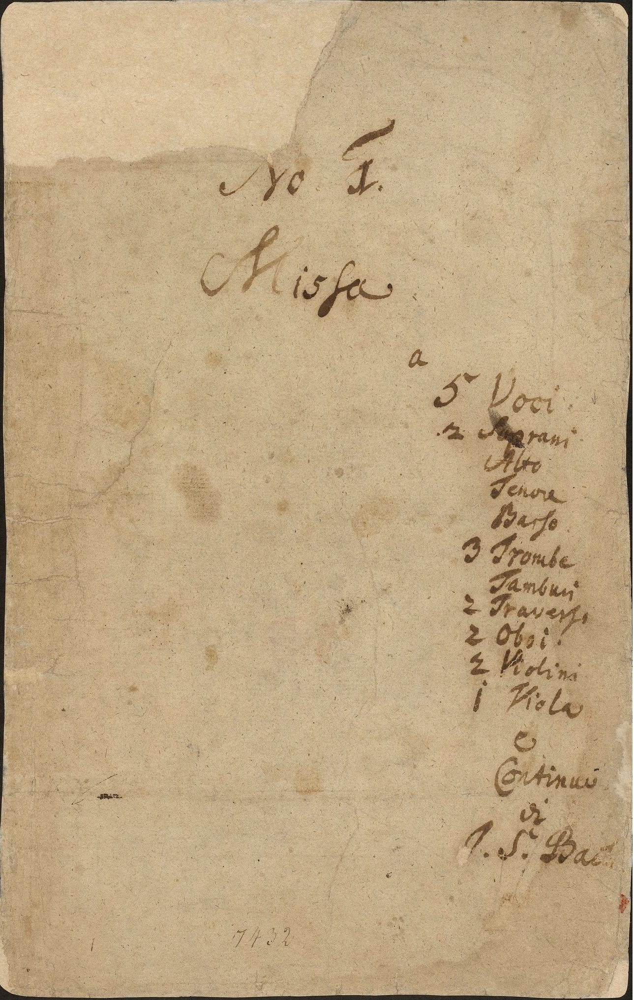 Johann Sebastian Bach, Messe in h-Moll BWV 232, Autograph des Titelblatts der Missa